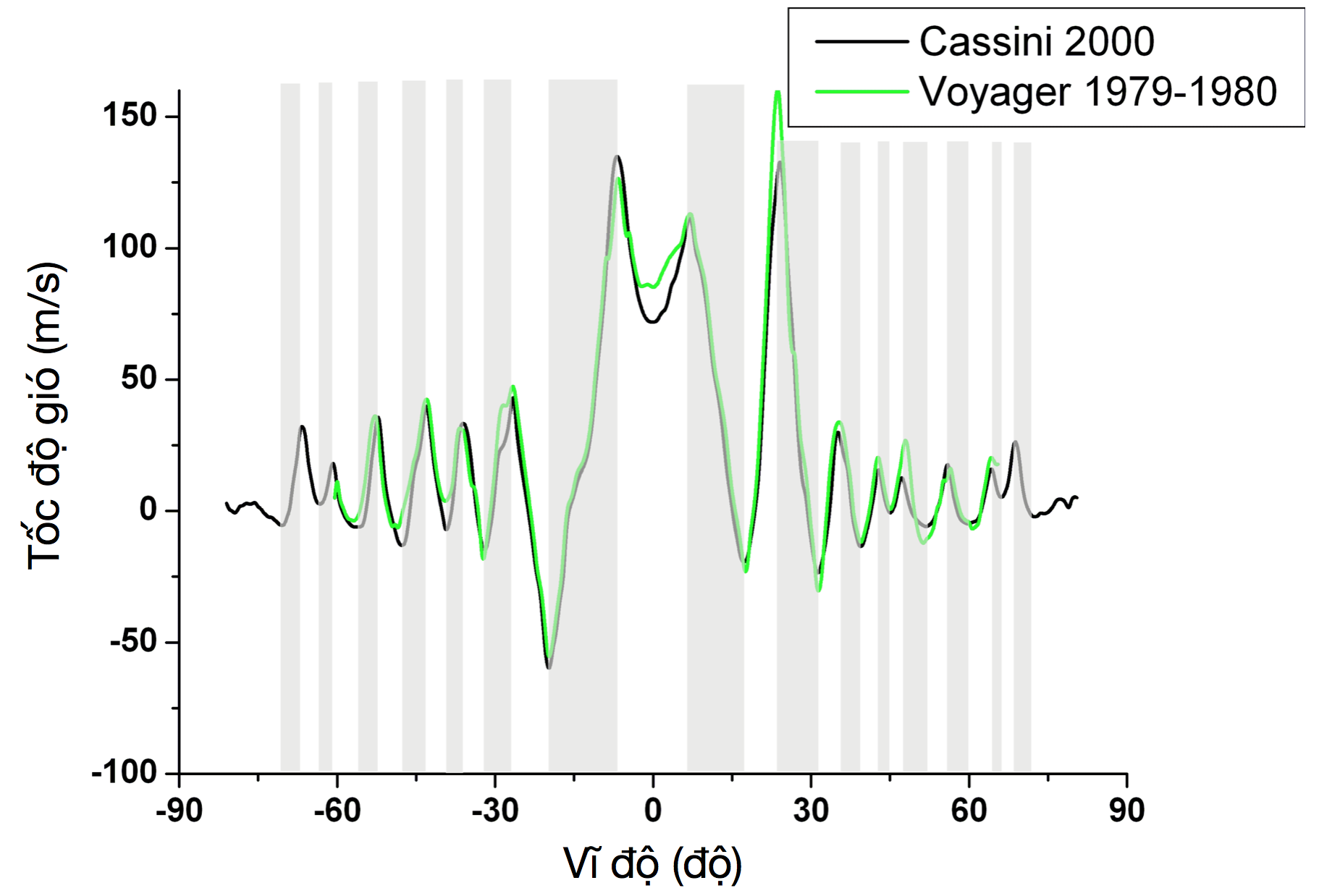 Dịch từ